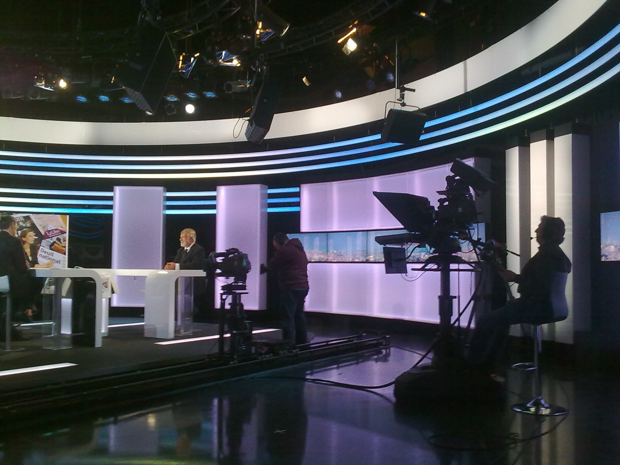 Intérieur d'un Studio de la RTBF au Bld Reyers à Bruxelles, mars 2012. Différentes caméra en action.